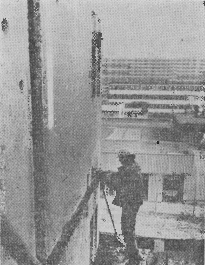 os. Rzeczypospolitej budynek nr 2 - grudzień 1977